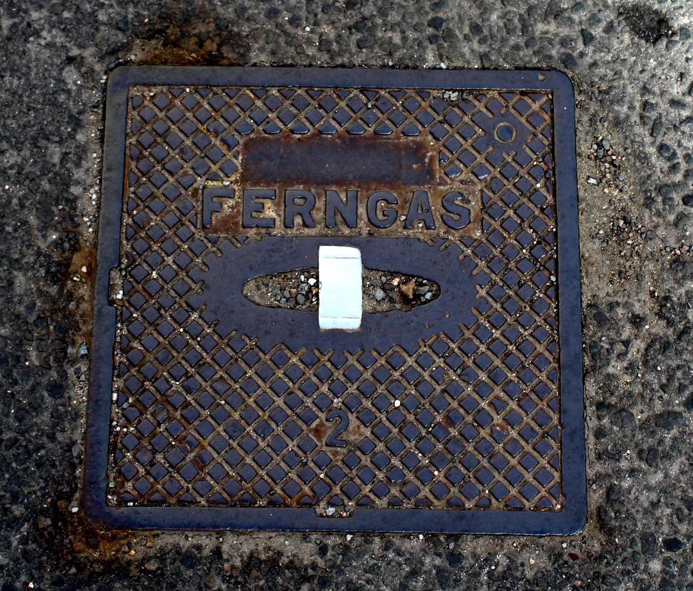 typische gußeiserne Straßenkappe mit der Aufschrift "Ferngas"; diese Kappe entspricht vermutlich der DIN 3582